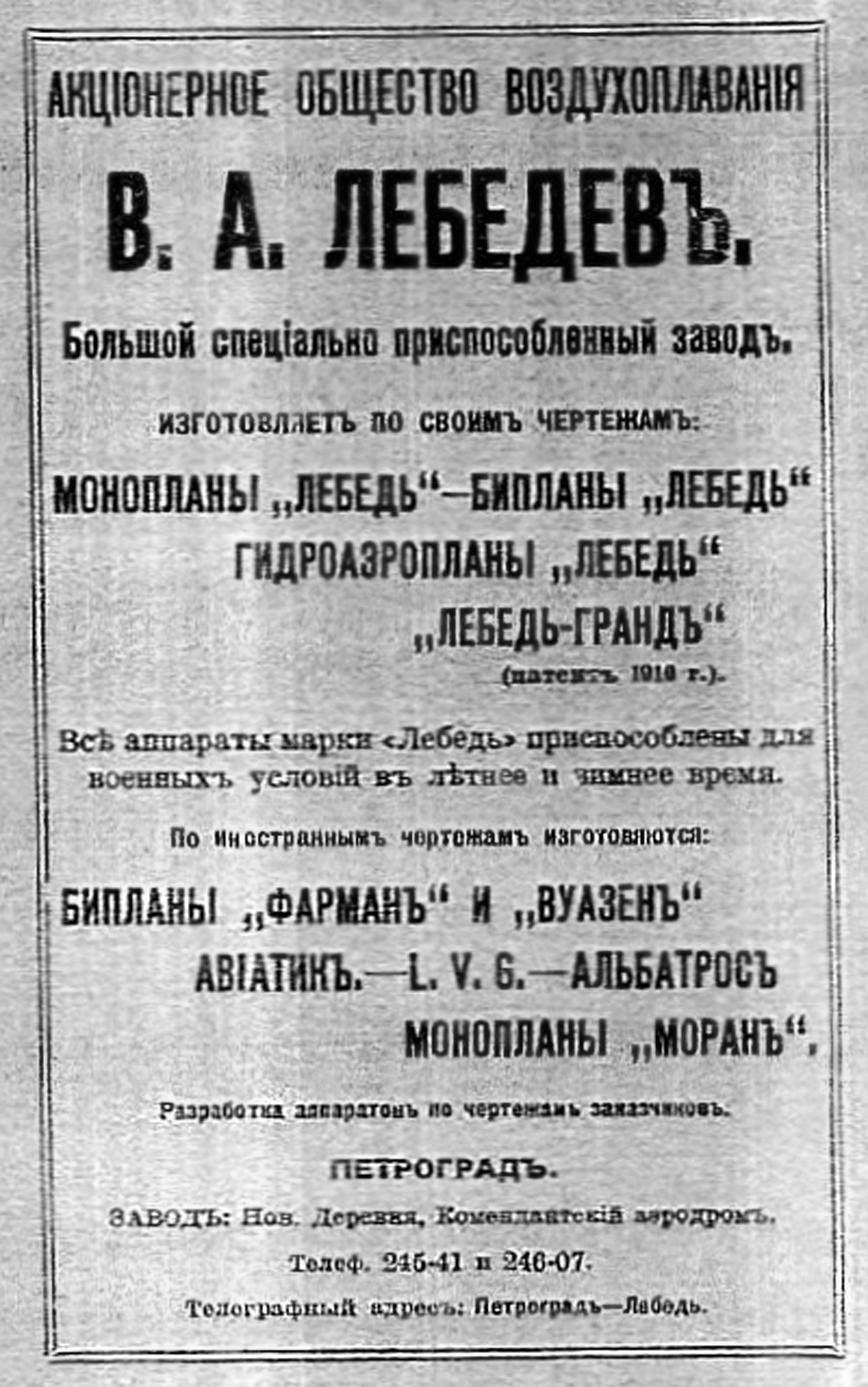 Рекламный листок АО воздухоплавания «В. А. Лебедев» в Петербурге